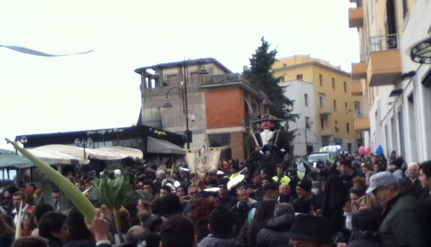 Carnevale di Frosinone